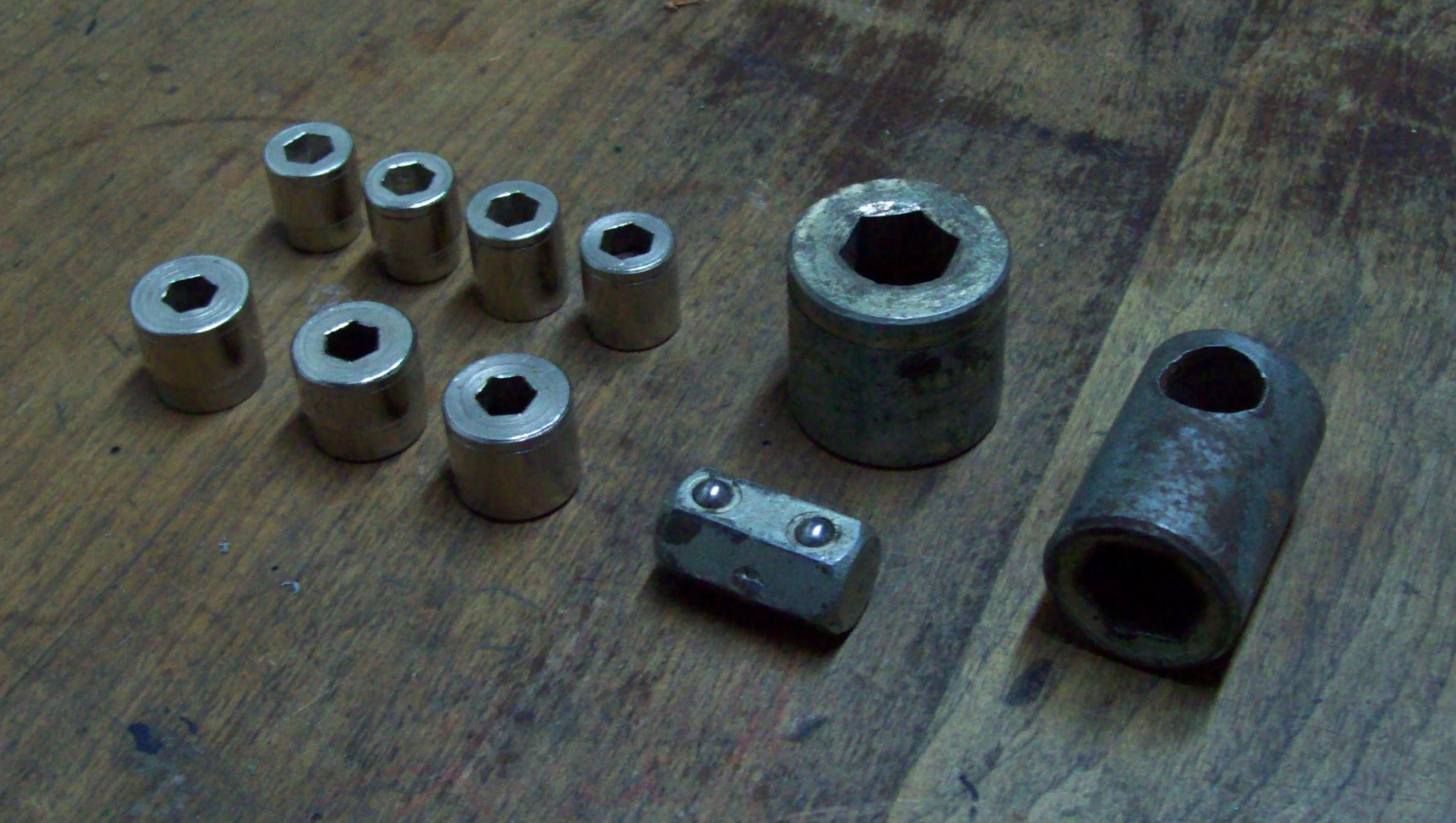 Es un juego de nueve barras de crique, (aunque falta uno, el más gruso y corto).